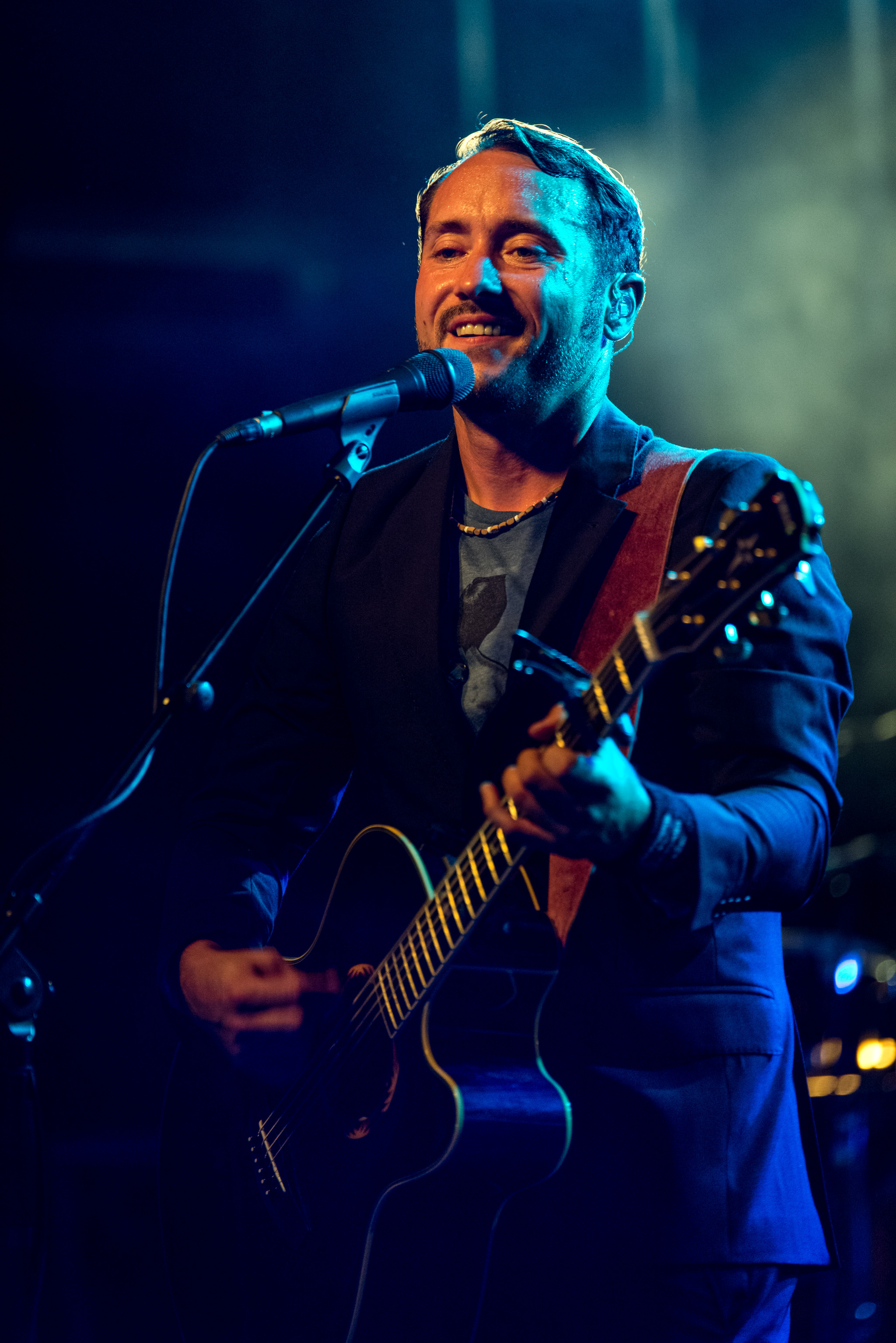 de